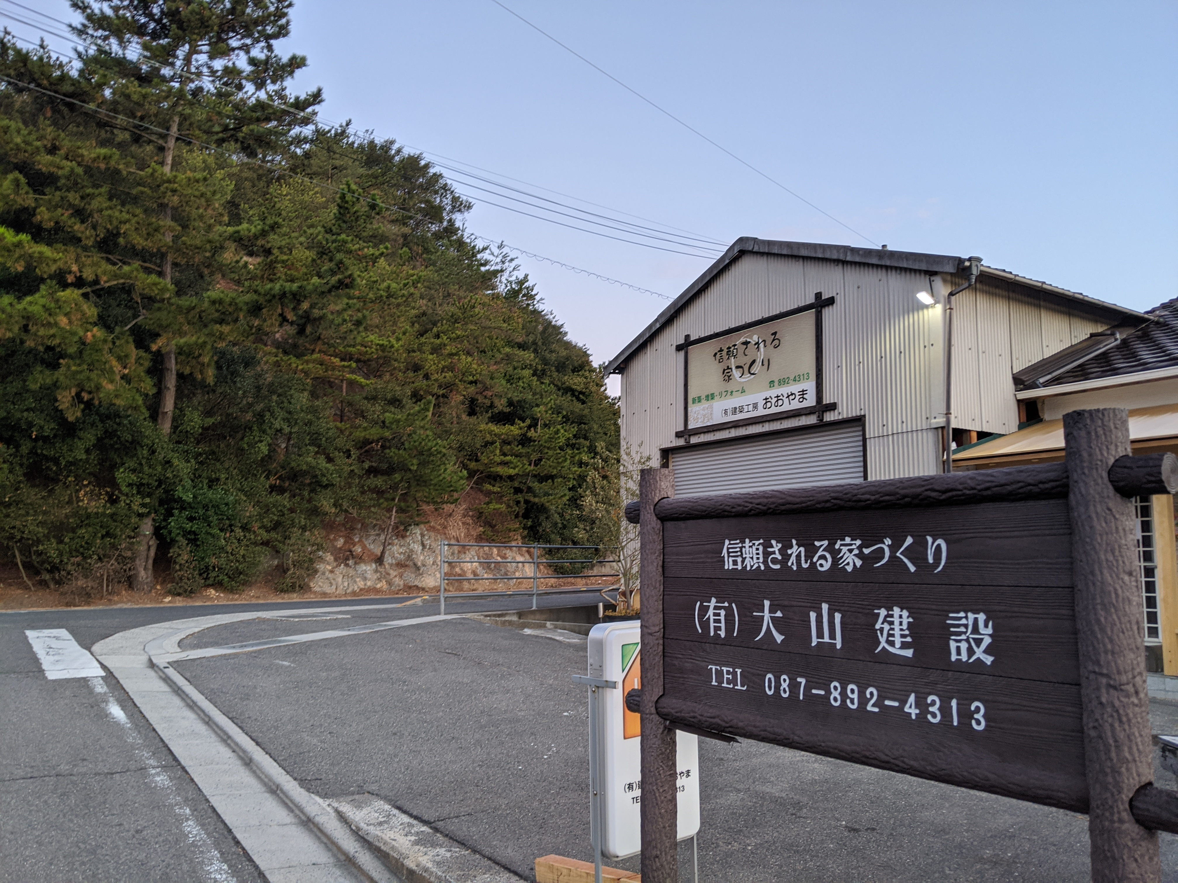 建築工房おおやま本社外観。